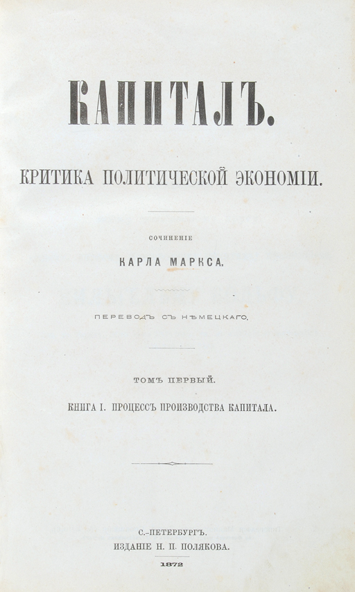 Карл Маркс, «Капитал», т. 1, титульный лист